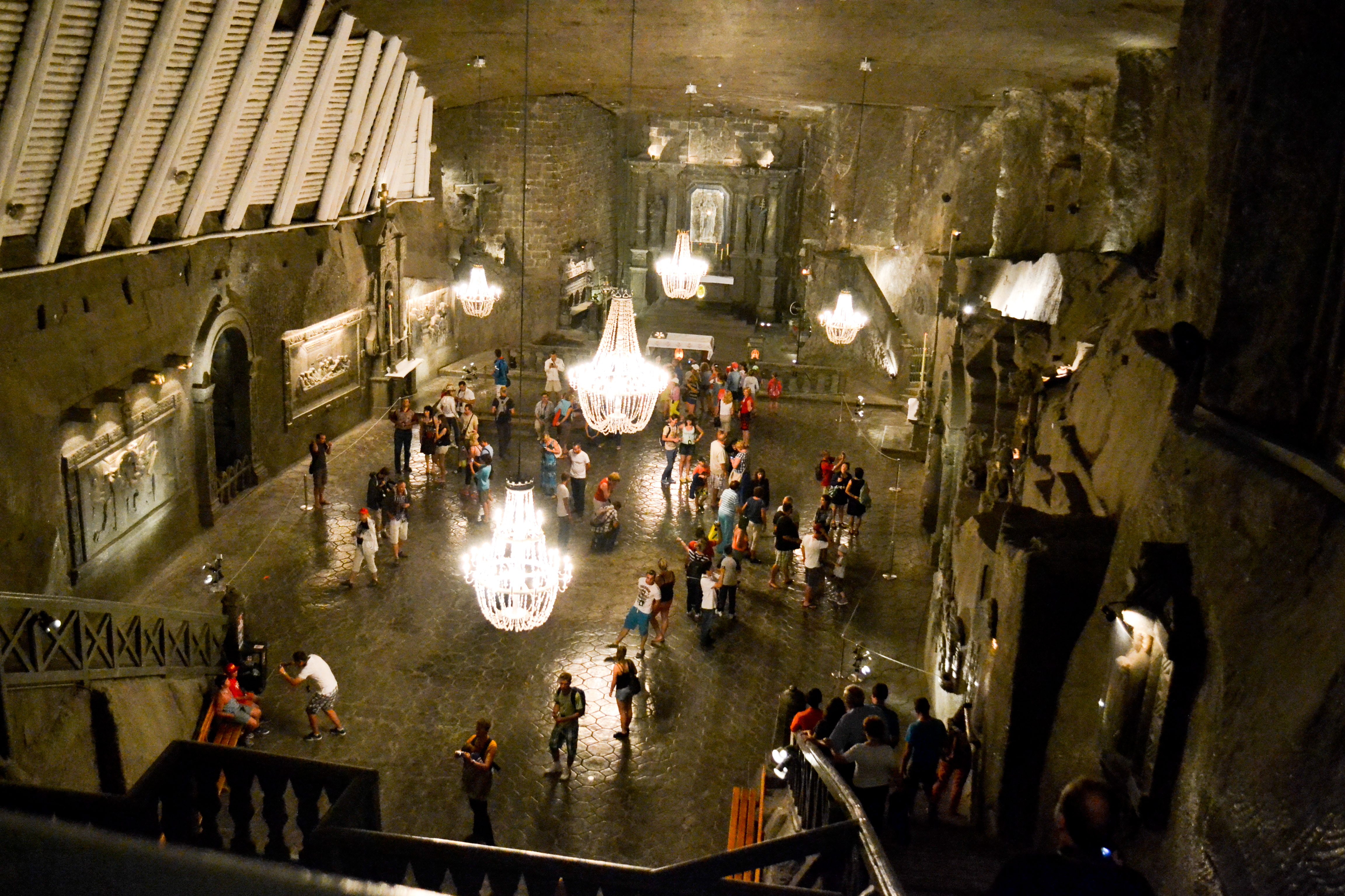 Wieliczka, kopalnia soli, XIII